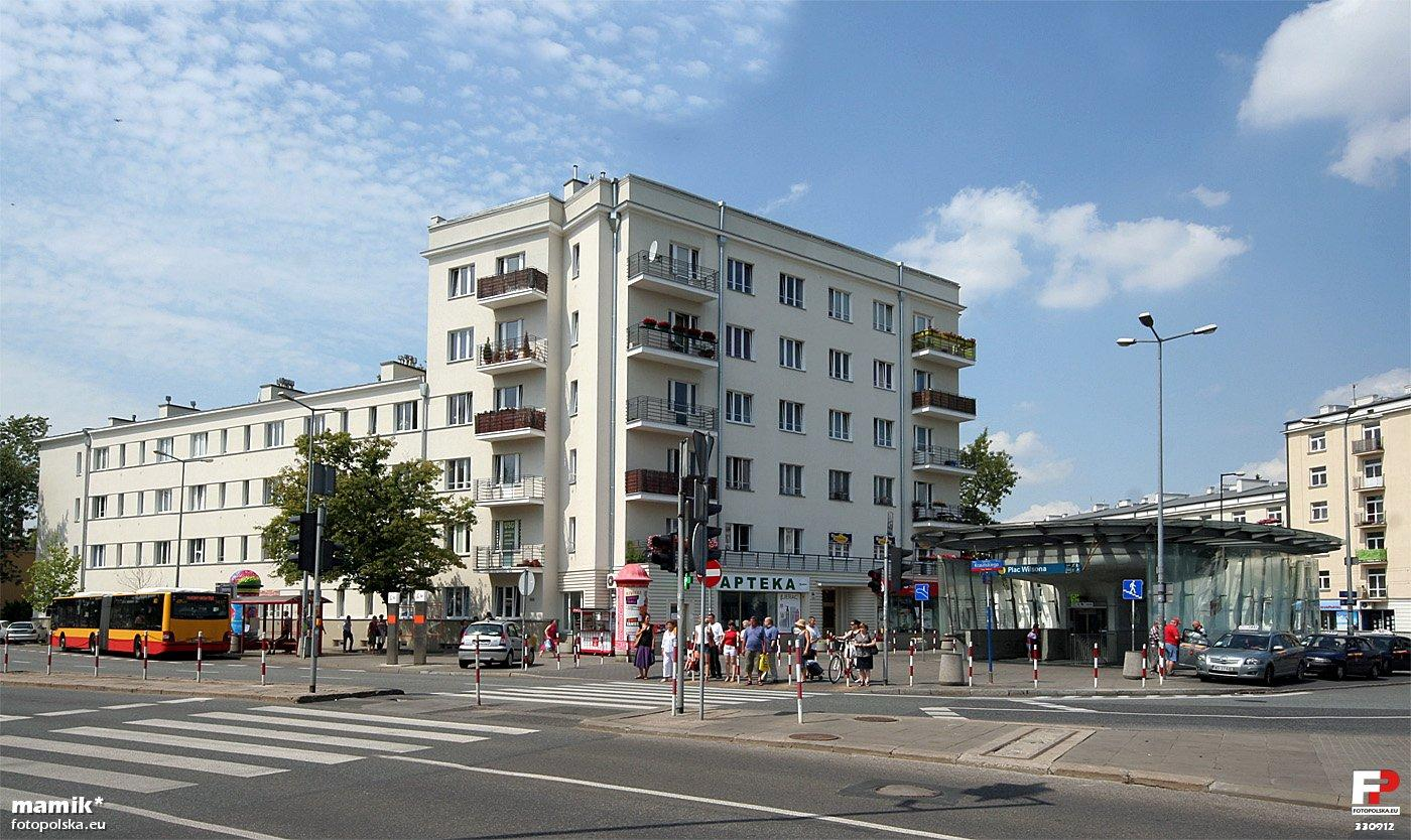 Narożna kamienica obok wejścia do stacji metra